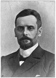 Den norske pedagogen Halfan Raabe.